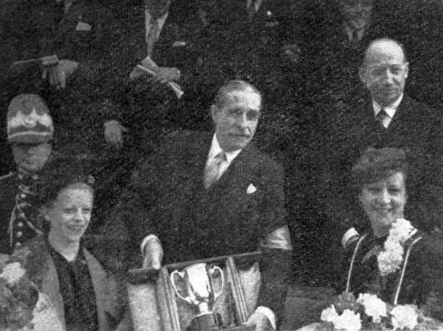 Remise de la Coupe des Dames 1939 du rallye Monte-Carlo à Mmes Yvonne Simon (G.) et Suzanne Largeot (D.).